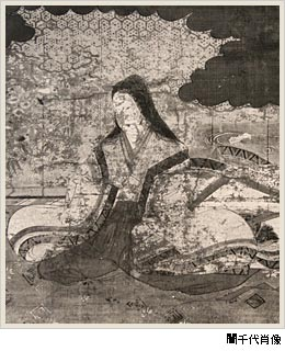 立花誾千代畫像